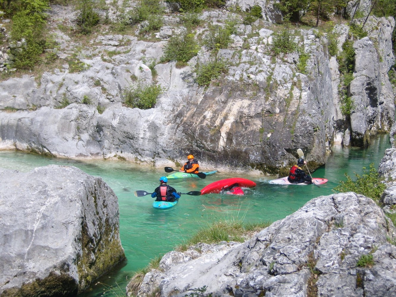 043 Kajakfahrer